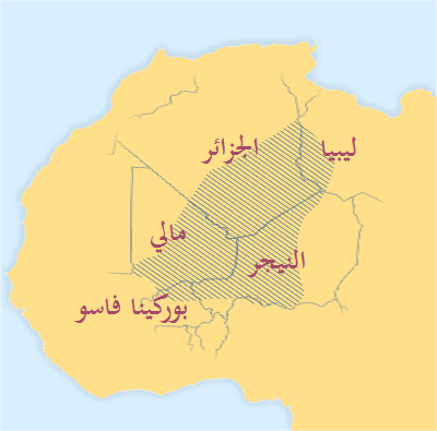 المناطق التي تعيشُ فيها نسبة مُعتبرة من الطوارق.